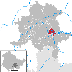 Kaulsdorf in Thuringia - District Saalfeld-Rudolstadt